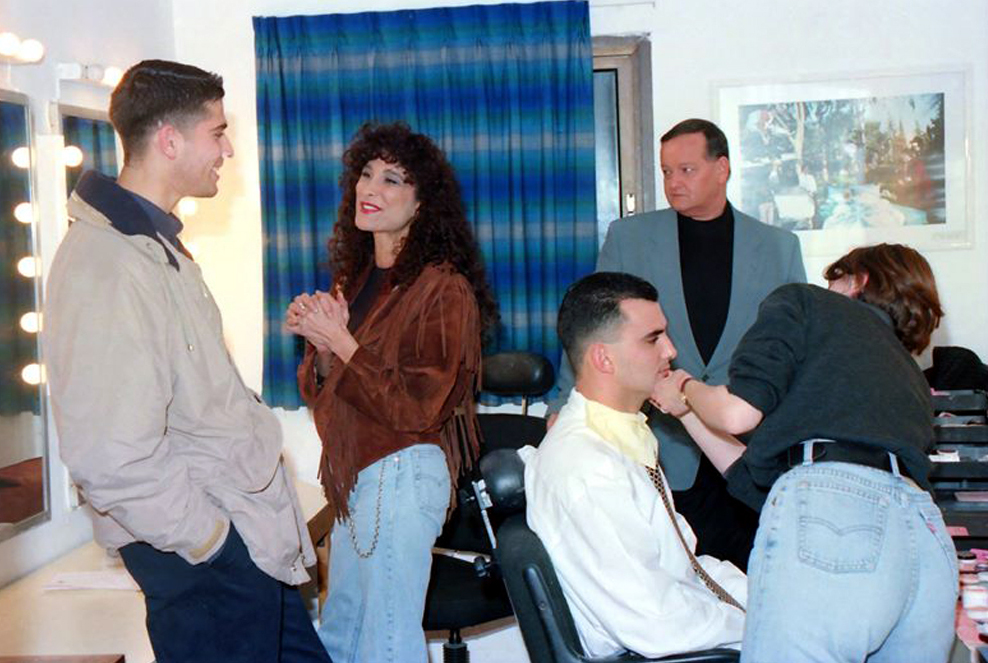 אביבה אבידן אבי נמני אלון חזן ודן שילון בחדר איפור לקראת שידור חי